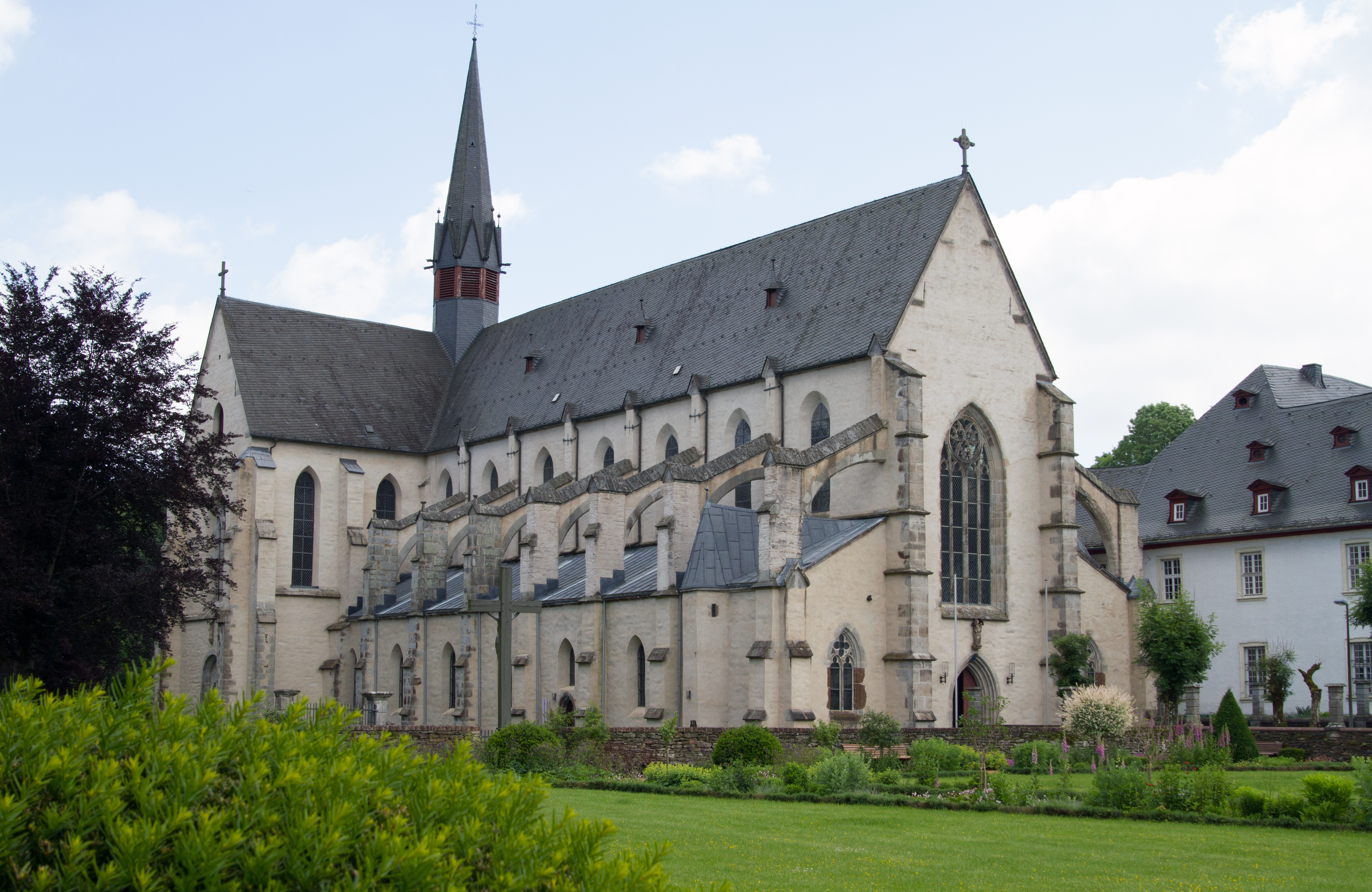 Eine Außenansicht der Abteikirche der Abtei Marienstatt im Westerwald.